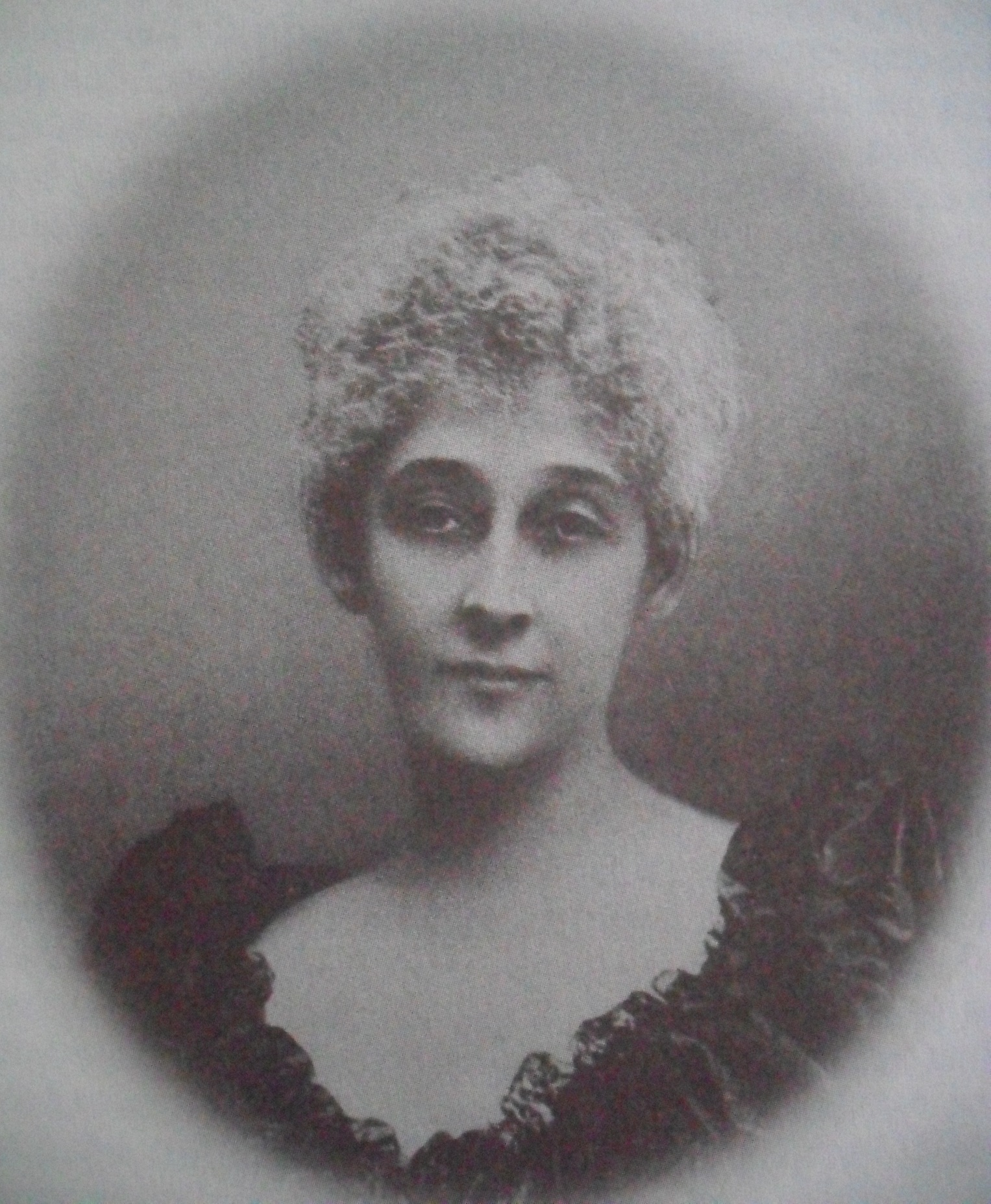 Marie Hoskier, fille du banquier danois Emile Hoskier, épouse de Eugène Roland-Gosselin, agent de change à Paris.